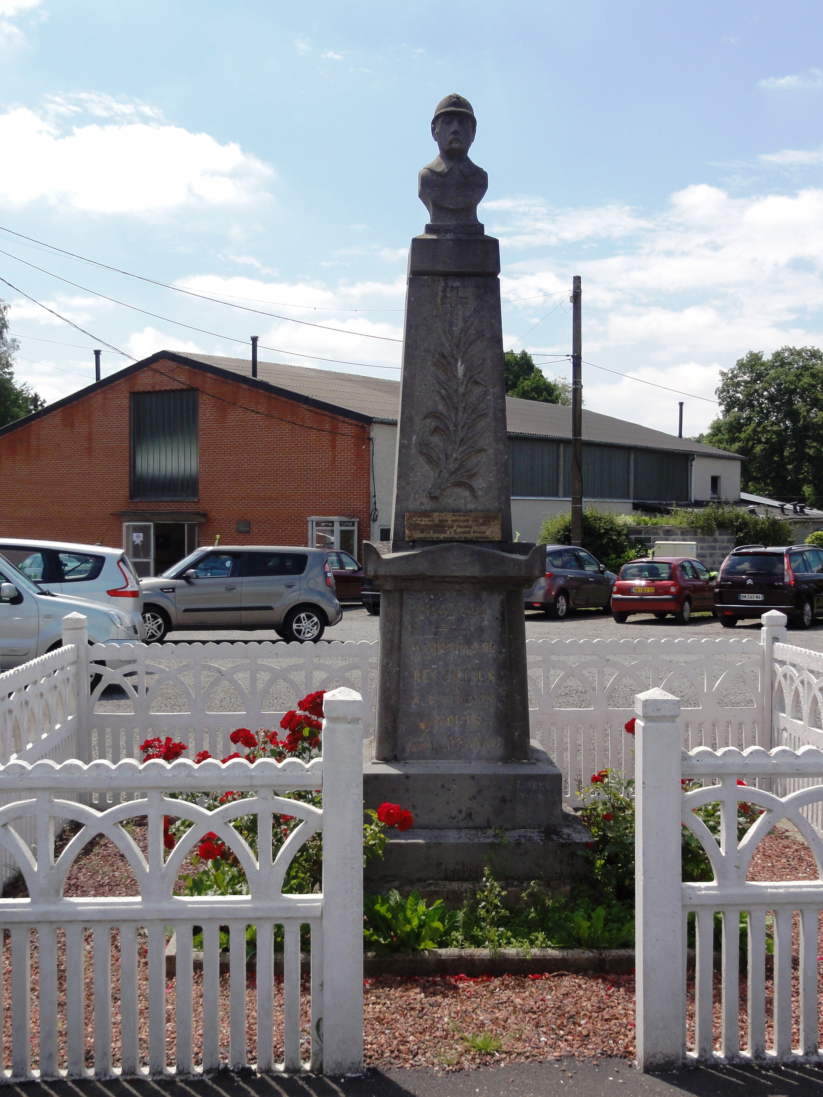 Bersillies (Nord, Fr) monument aux morts.